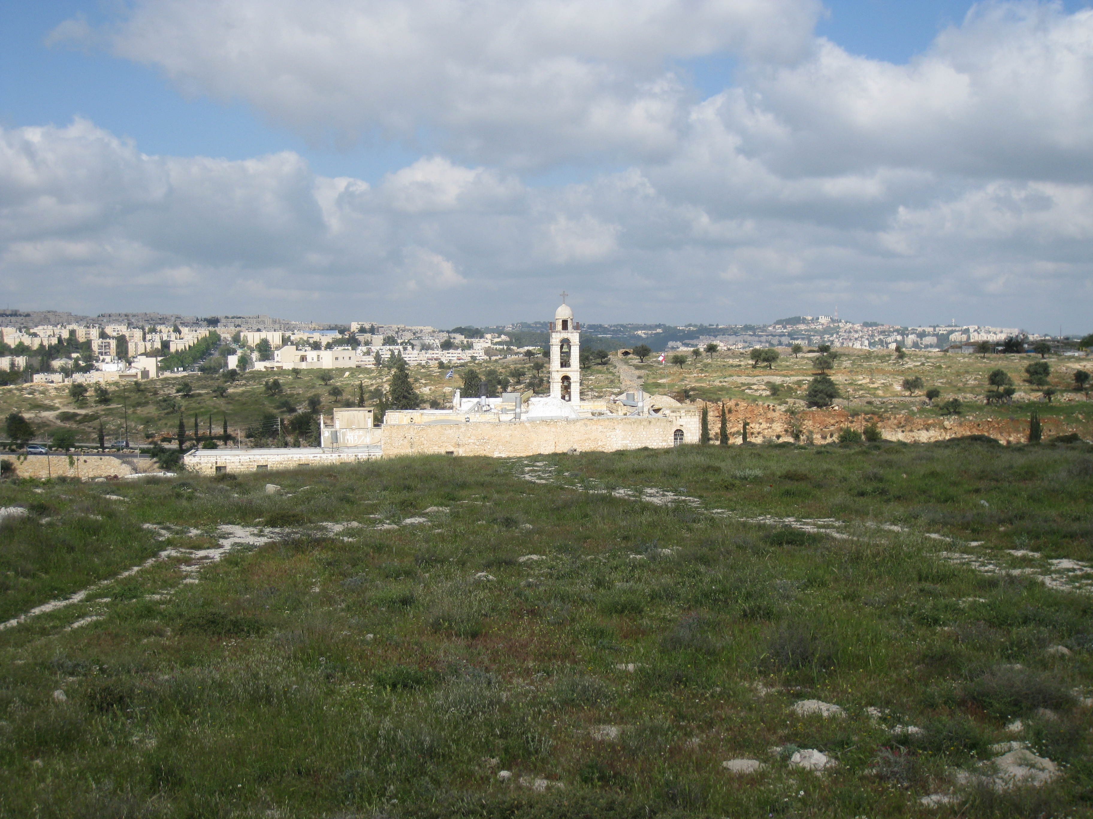 Givat HaArbaa, near Hebron road, Jerusalem View towards Mar Elias Monastery גבעת הארבעה, מזרחית לדרך חברון ודרומית לרמת רחל, ירושלים ברגע - מנזר מר אליאס